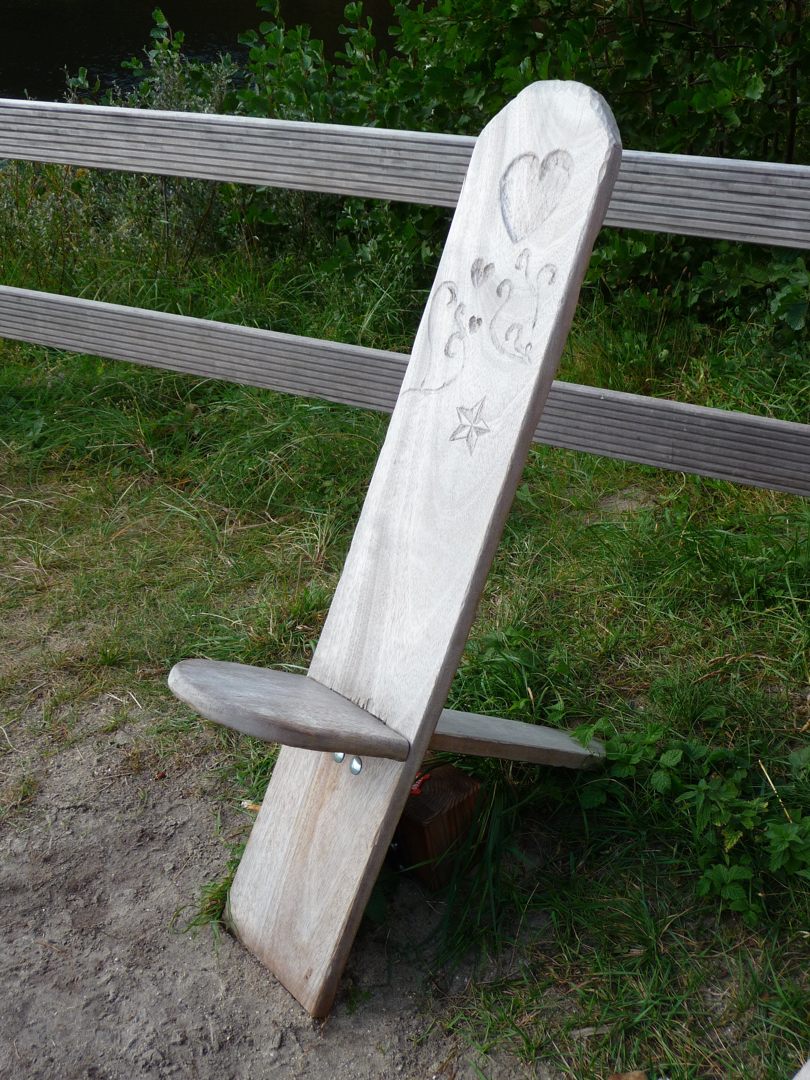 Steckstuhl mit beschnitzer Lehne (angefertigt von Schülern der Freien Waldorfschule Wetterau in Bad Nauheim), fotografiert auf der ostfriesischen Nordseeinsel Juist (Niedersachsen, Deutschland) als Teil des Otto-Leege-Pfades